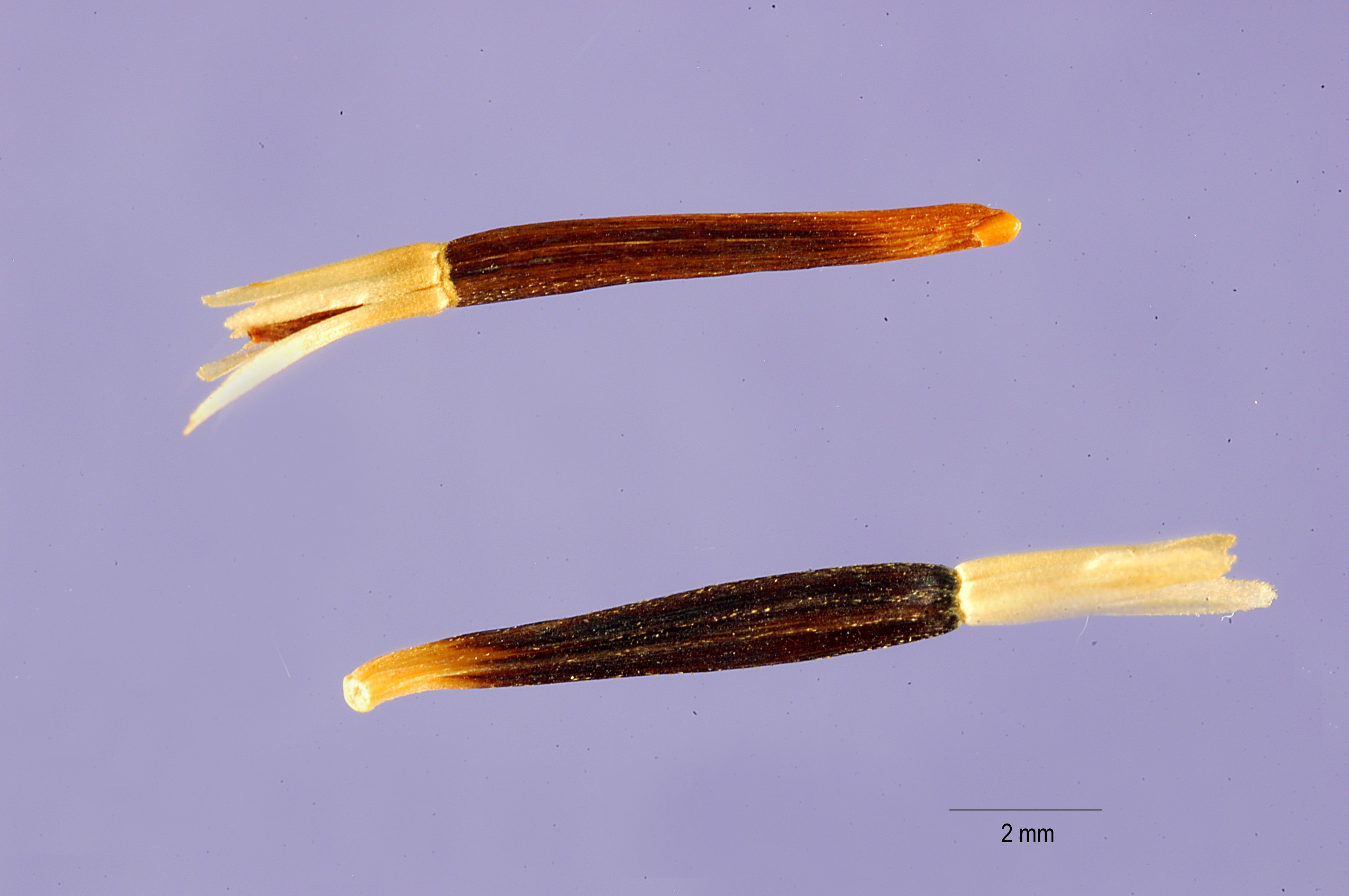 Tagetes erecta achenes